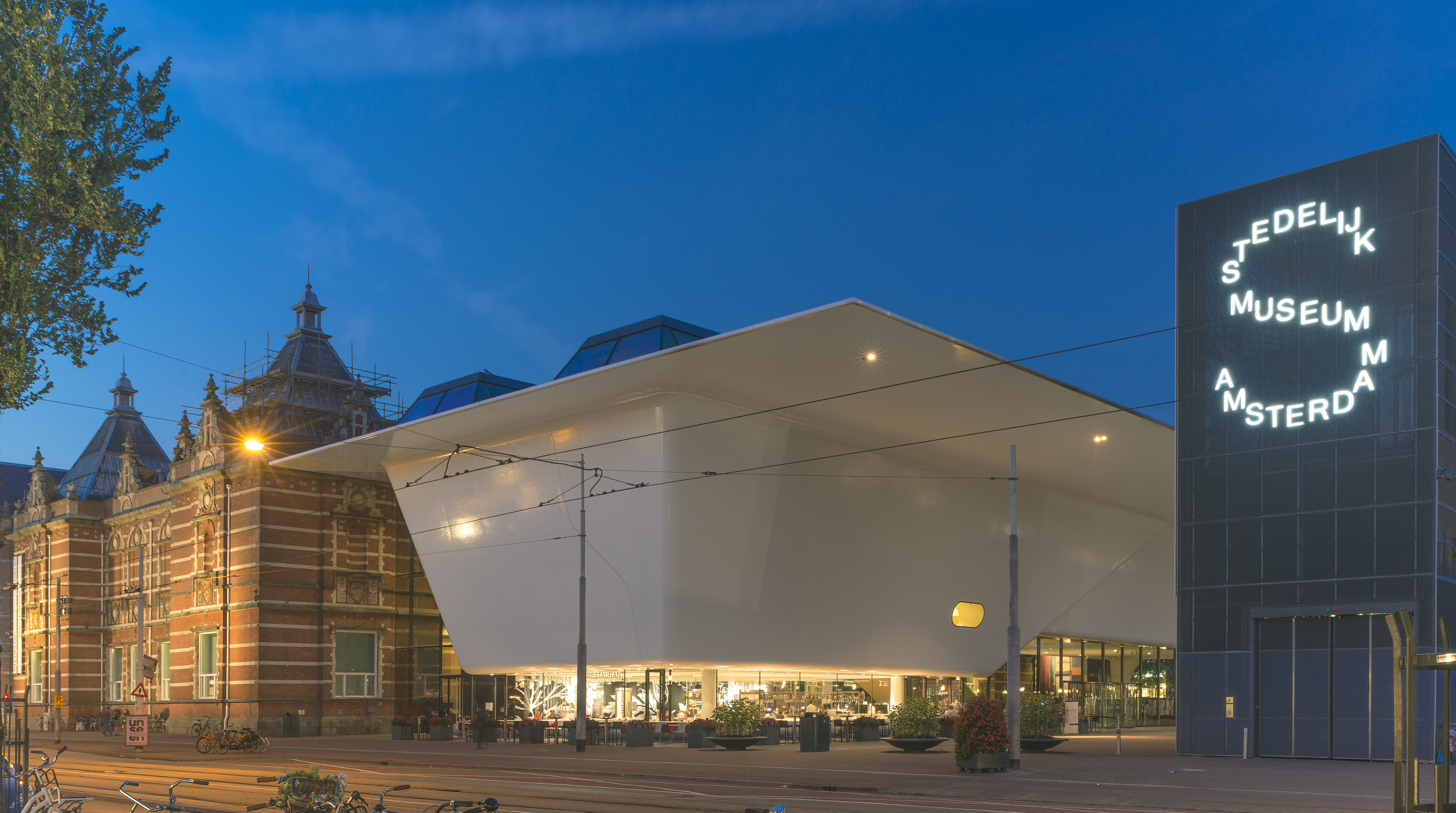 De nieuwe vleugel van het Stedelijk Museum Amsterdam